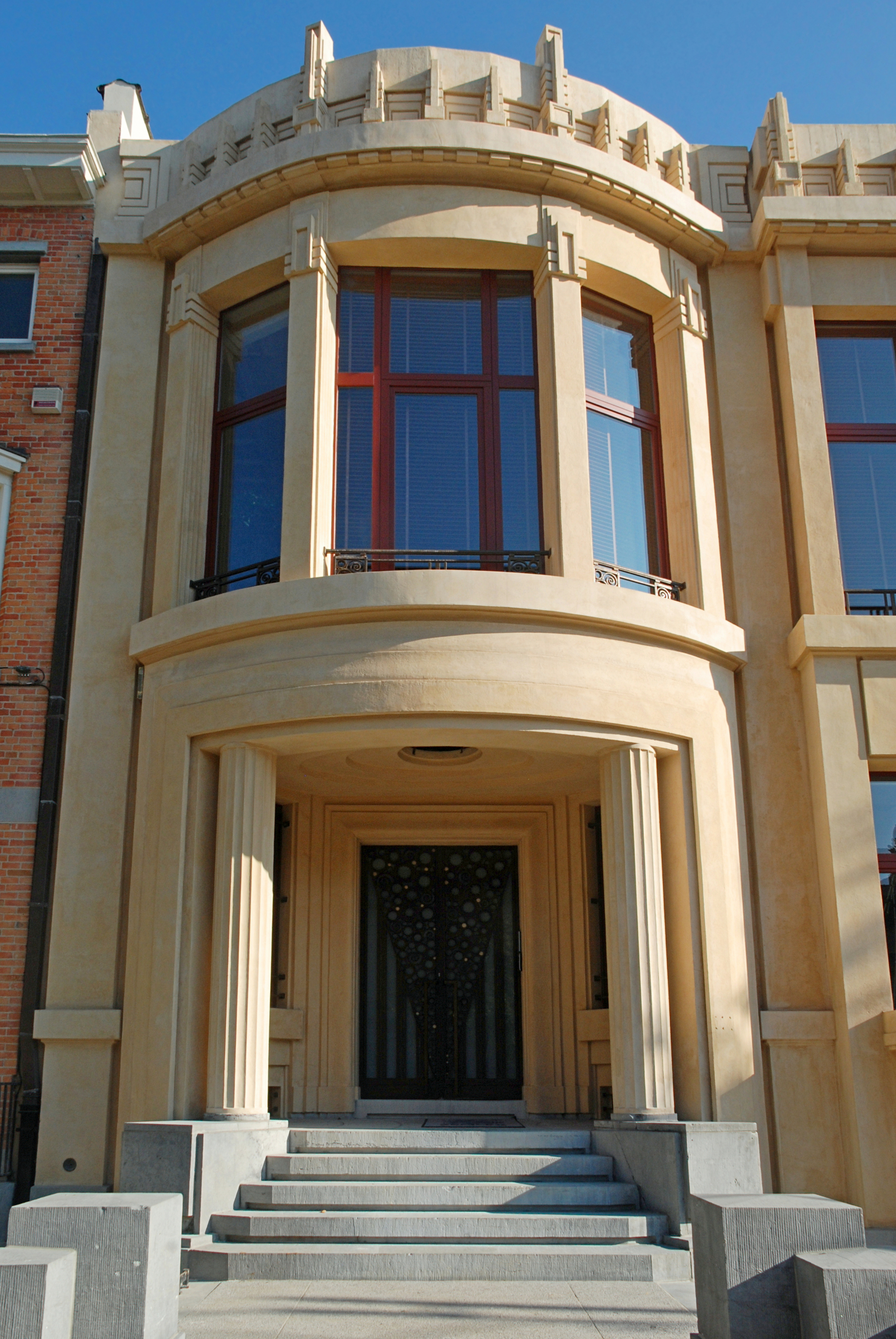 Belgique - Bruxelles - Uccle - Hôtel Haerens (Art déco - Antoine Courtens - 1928)